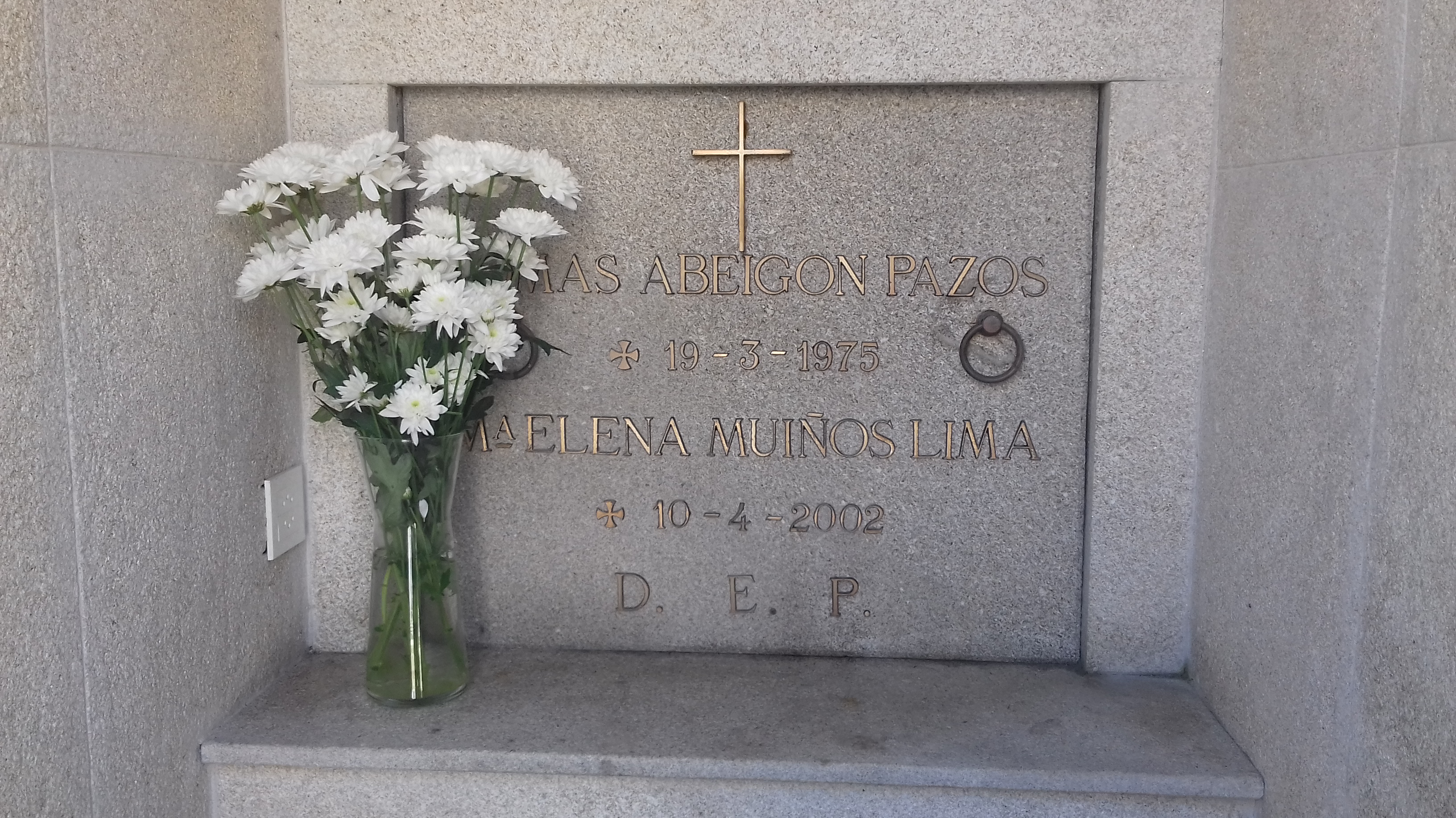 Lápida de Tomás Abeigón Pazos e María Elena Muíños Lima